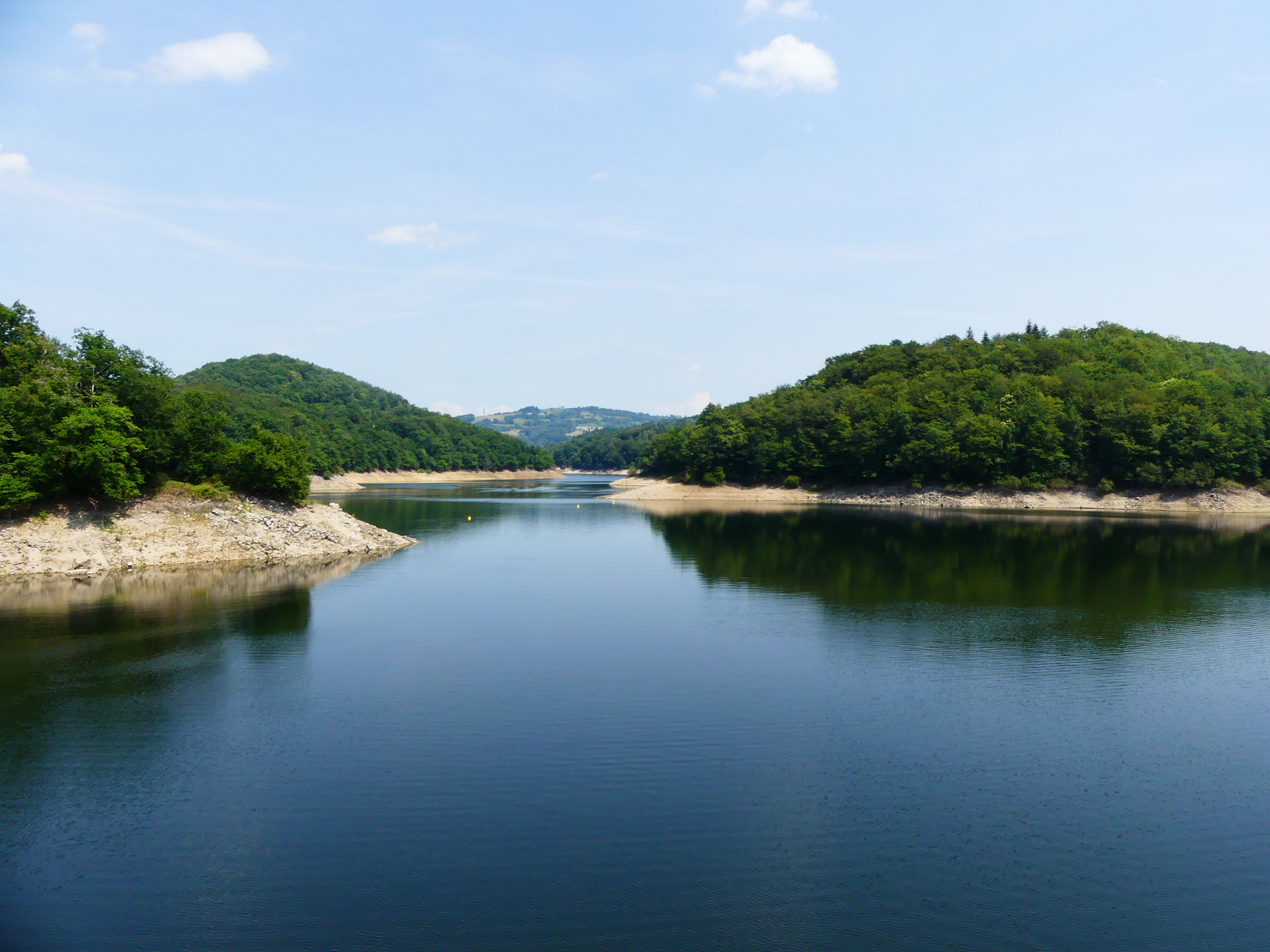 Le lac de Maury, commune de Saint-Amans-des-Cots, Aveyron, France. Au fond, la vallée ennoyée de la Selves. Photo prise depuis la commune de Florentin-la-Capelle.